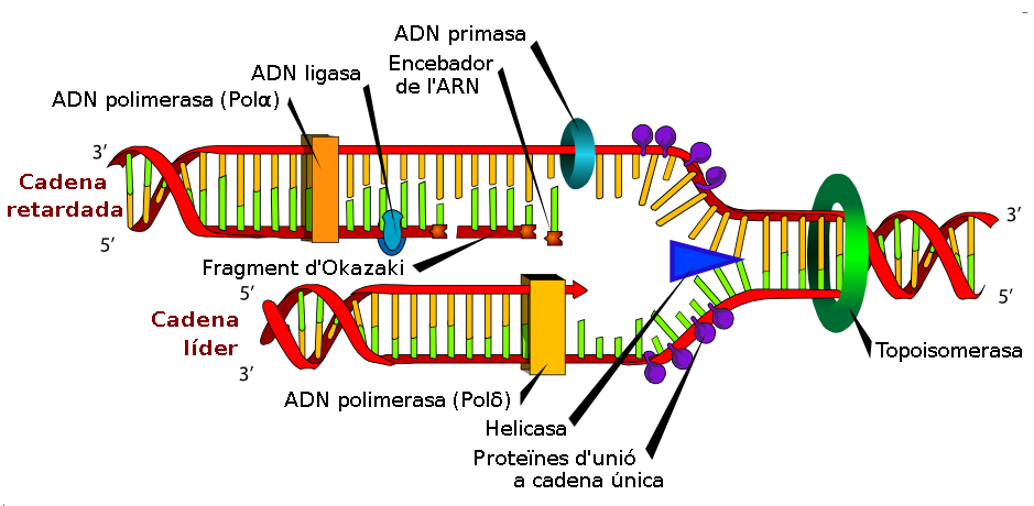 La replicació de l'ADN o síntesi de l'ADN és el procés pel qual es copia una molècula d'ADN bicatenari. Aquest procés és essencial per la vida tal com la coneixem.